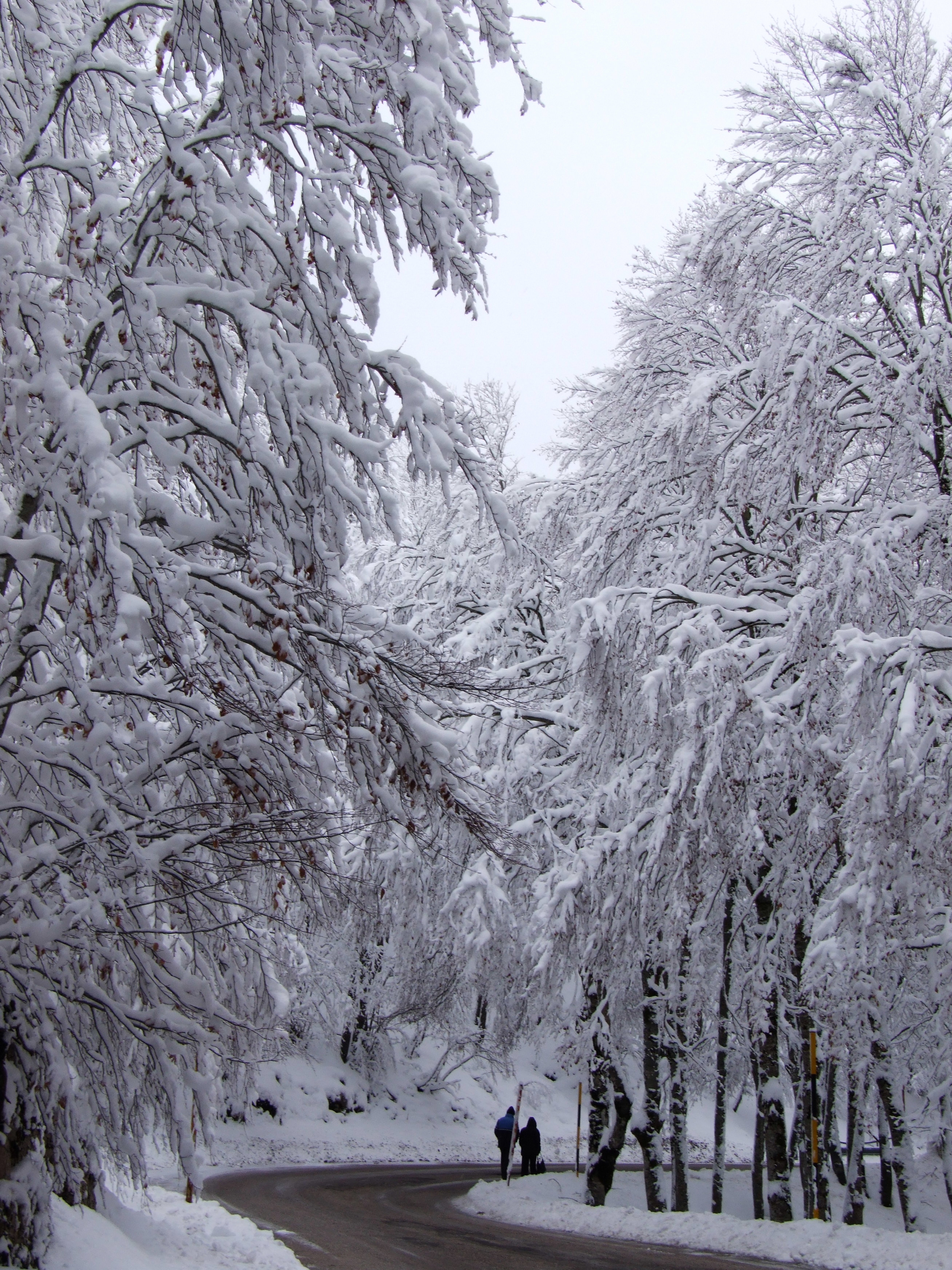 Valle Fredda This is a photo of a monument which is part of cultural heritage of Italy.